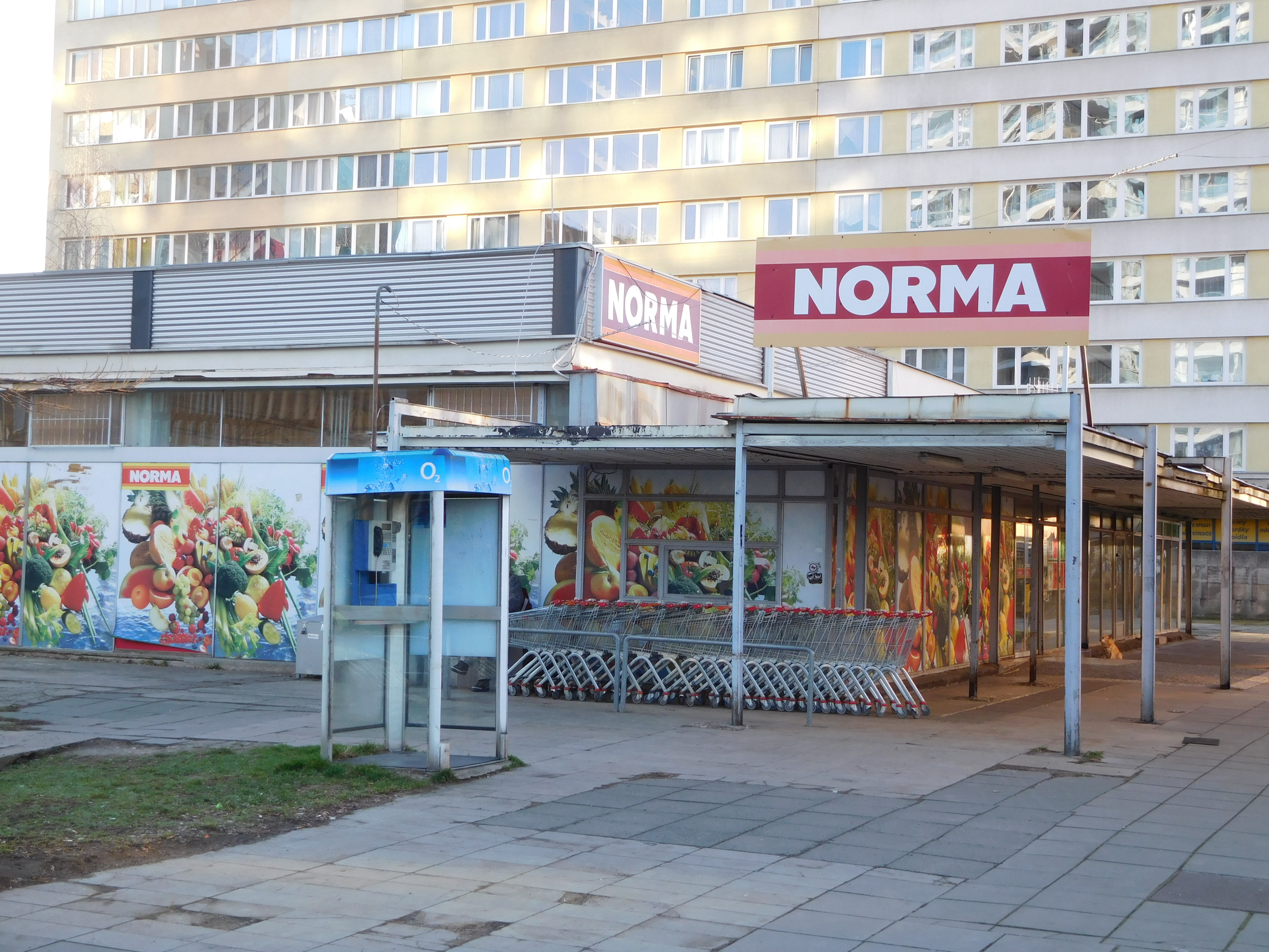 Praha - Pankrác, Pujmanové/Horáčkova - Norma